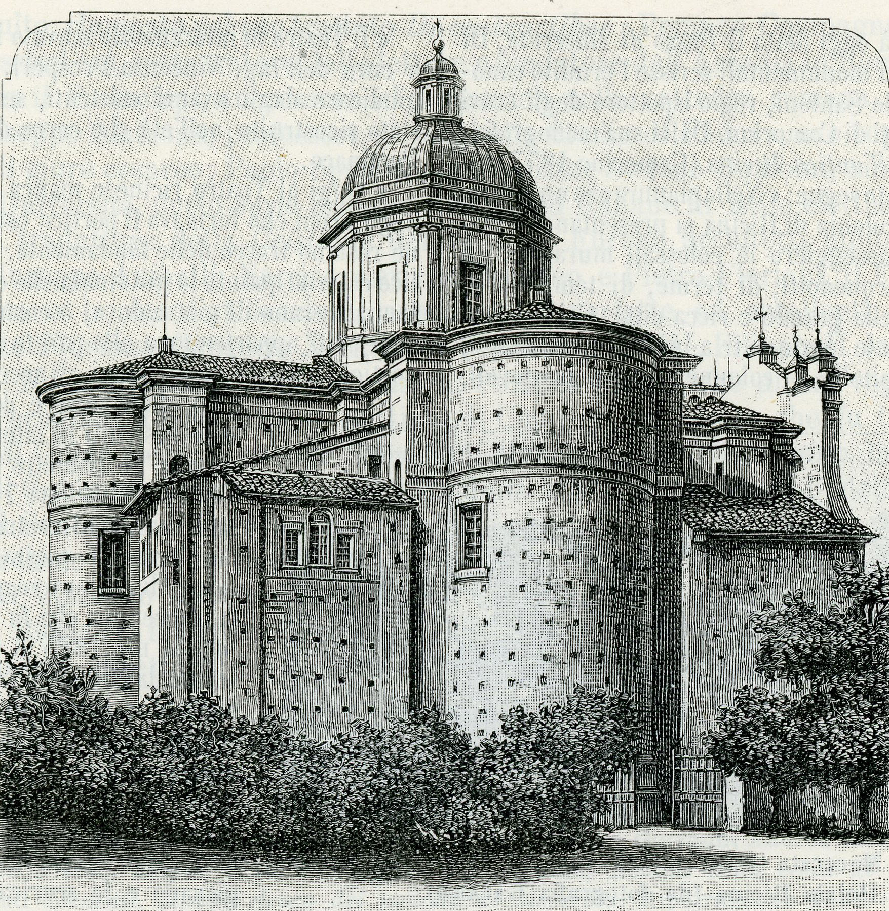 Macerata: parte posteriore della chiesa di S. Maria delle Vergini (xilografia).